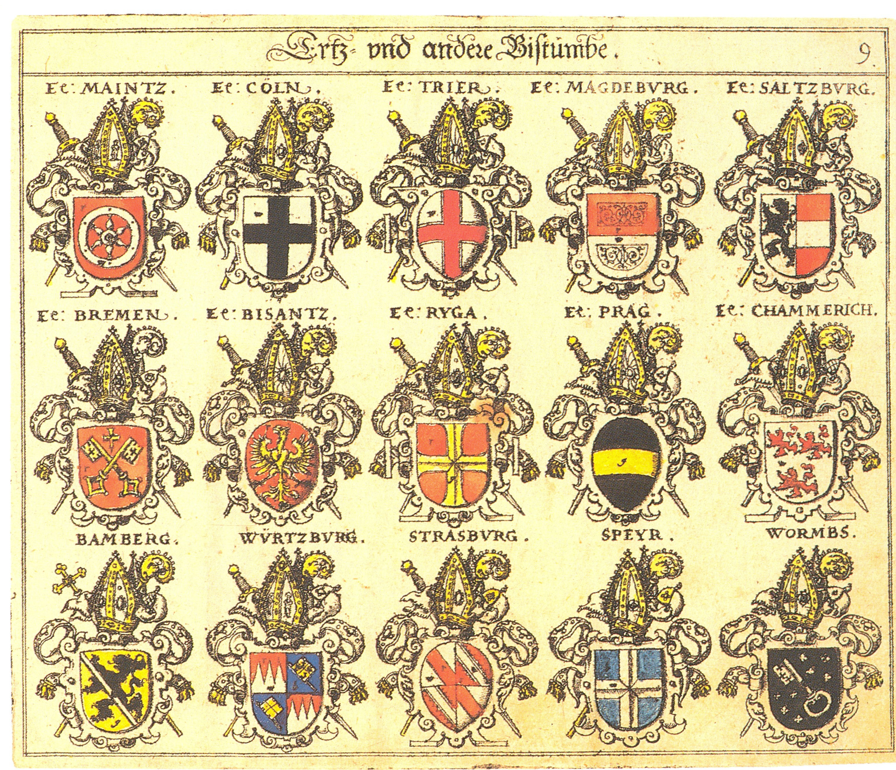 Johann Siebmacher: New Wappenbuch Erz- und andere Bistümer Blatt 9 eingescannt aus: Horst Appuhn (Hrsg.), Johann Siebmachers Wappenbuch. Die bibliophilen Taschenbücher 538, 2. verb. Aufl , Dortmund 1989